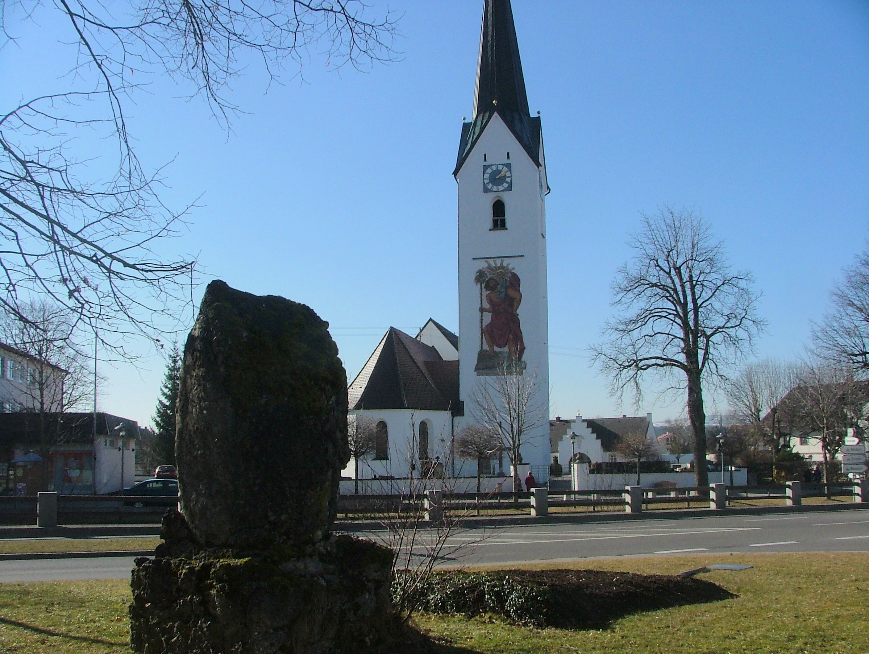 Durach